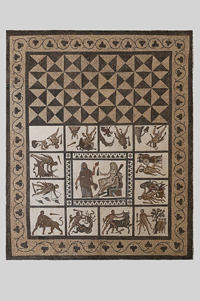 Mosaico de los trabajos de Hércules (Cultura Romana). Número de inventario: 38315BIS.